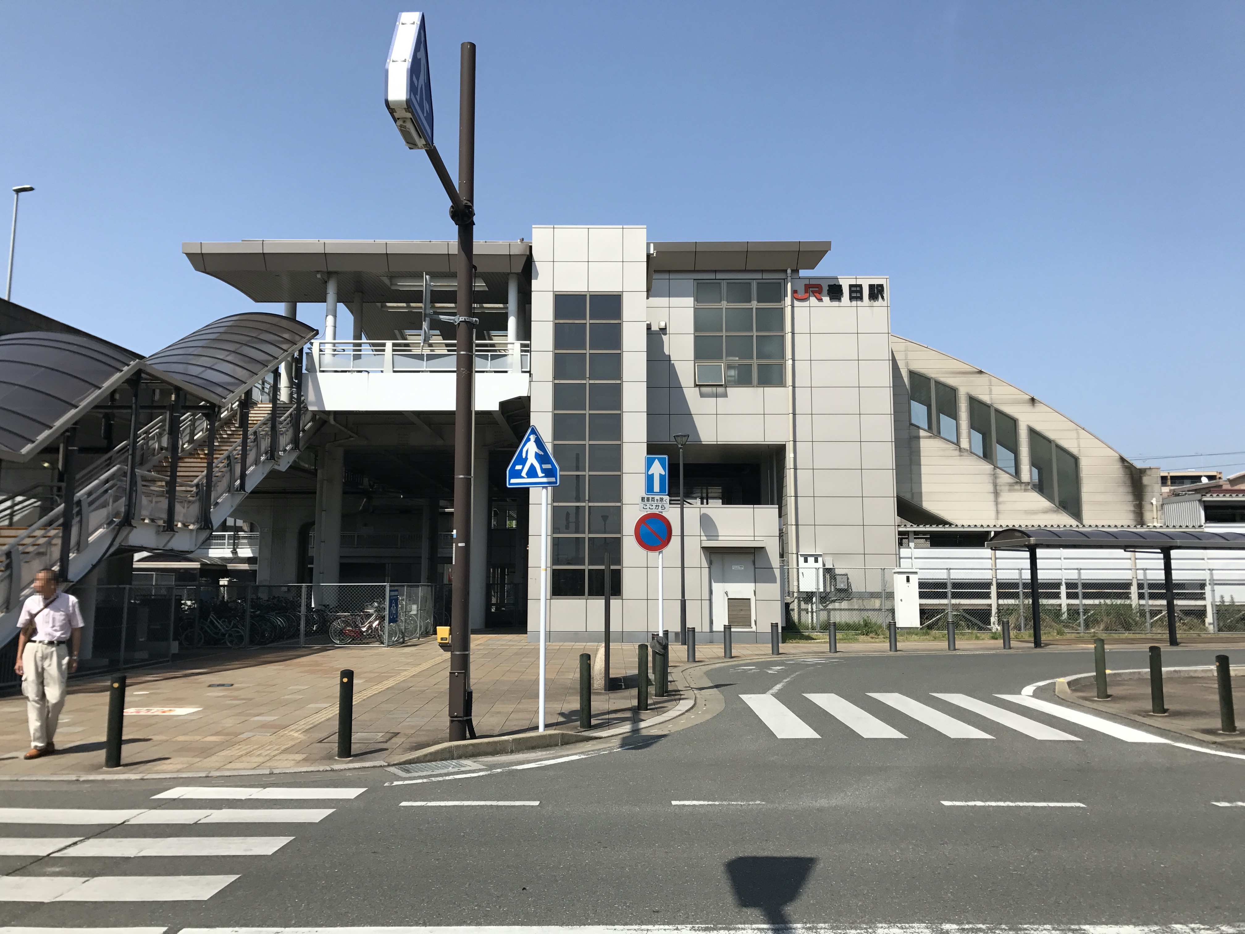 春日駅駅舎